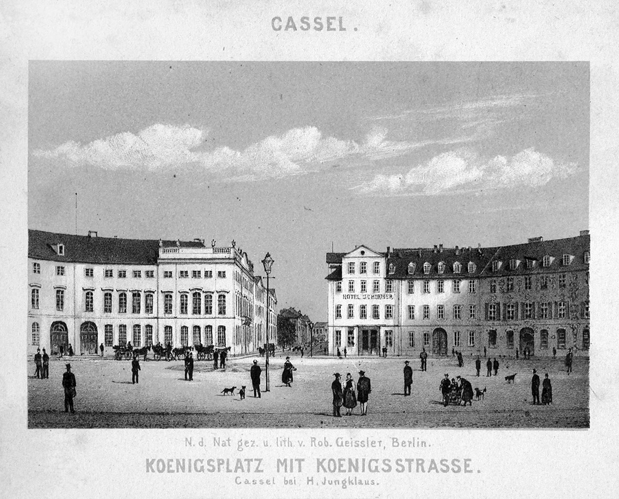 Lithographie des Königsplatzes in Kassel um 1860. Links das Palais Hessen-Rotenburg.